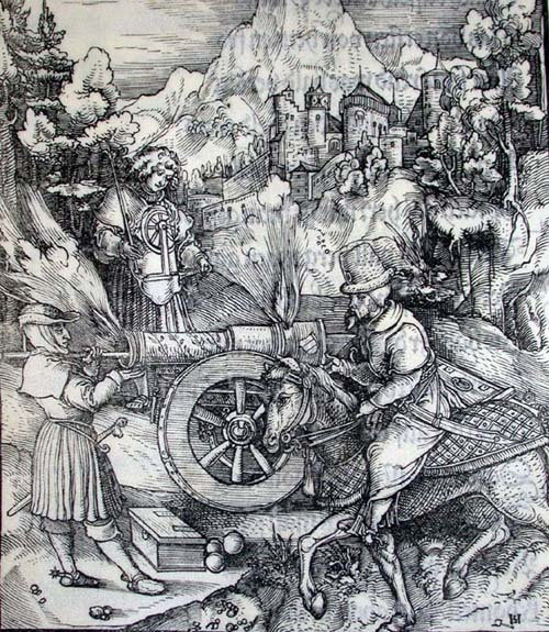 Theuerdank. Holzschnittillustration zu Kapitel 39